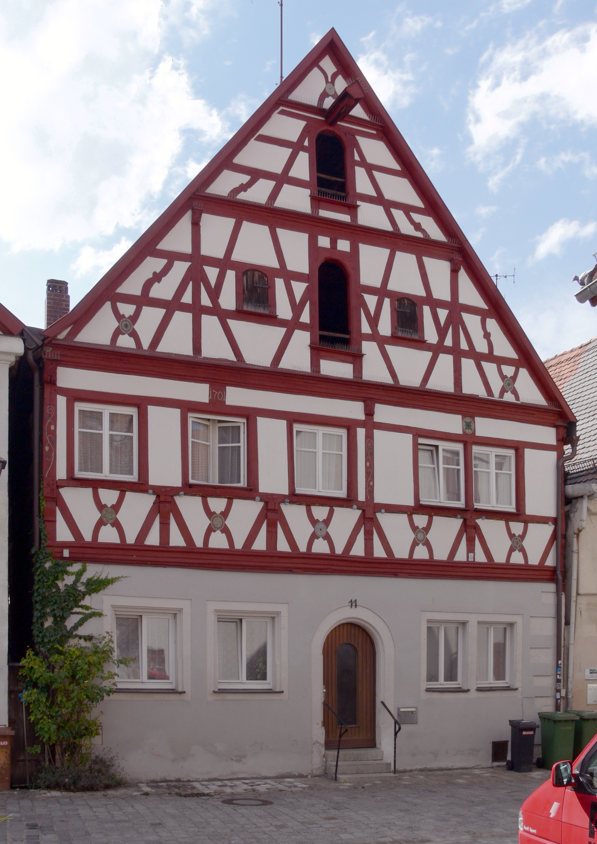 denkmalgeschütztes Haus in Weißenburg (Bayern), Pflastergasse 11This is a photograph of an architectural monument., no. D-5-77-177-340